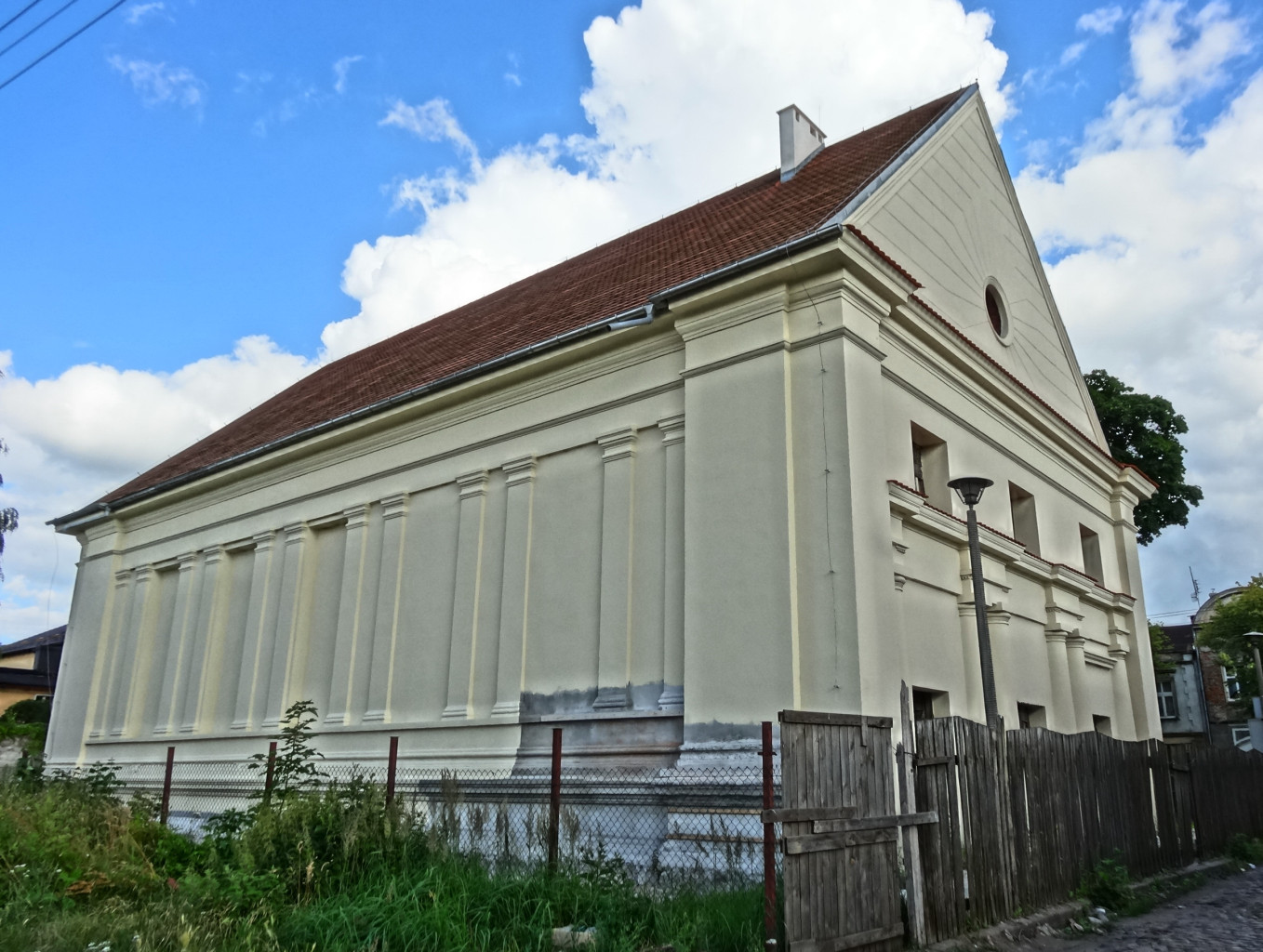 Dawna synagoga żydowska w Bydgoszczy-Fordonie